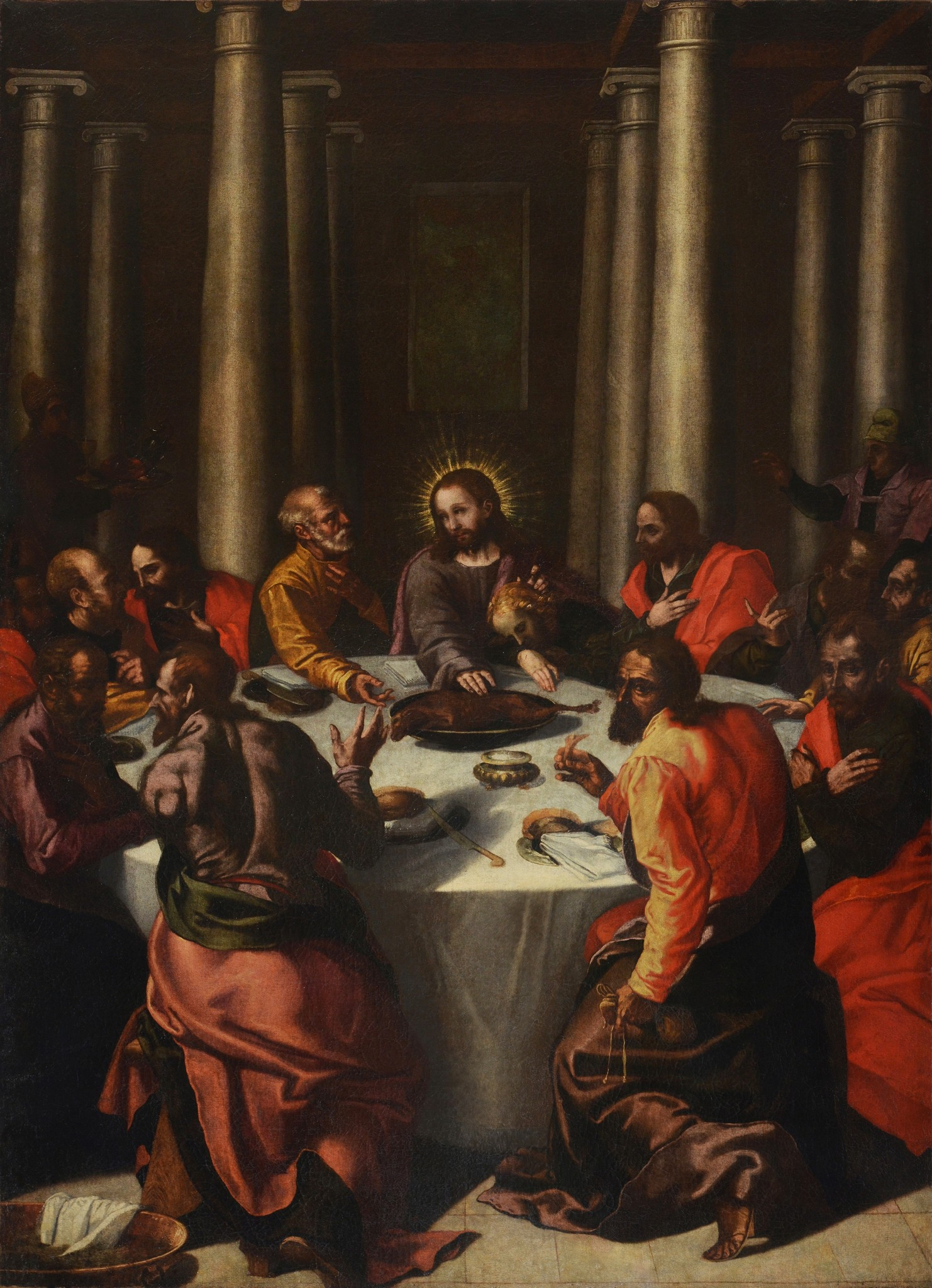 Tela dell'Ultima Cena firmata Gaspar Hovic 15**